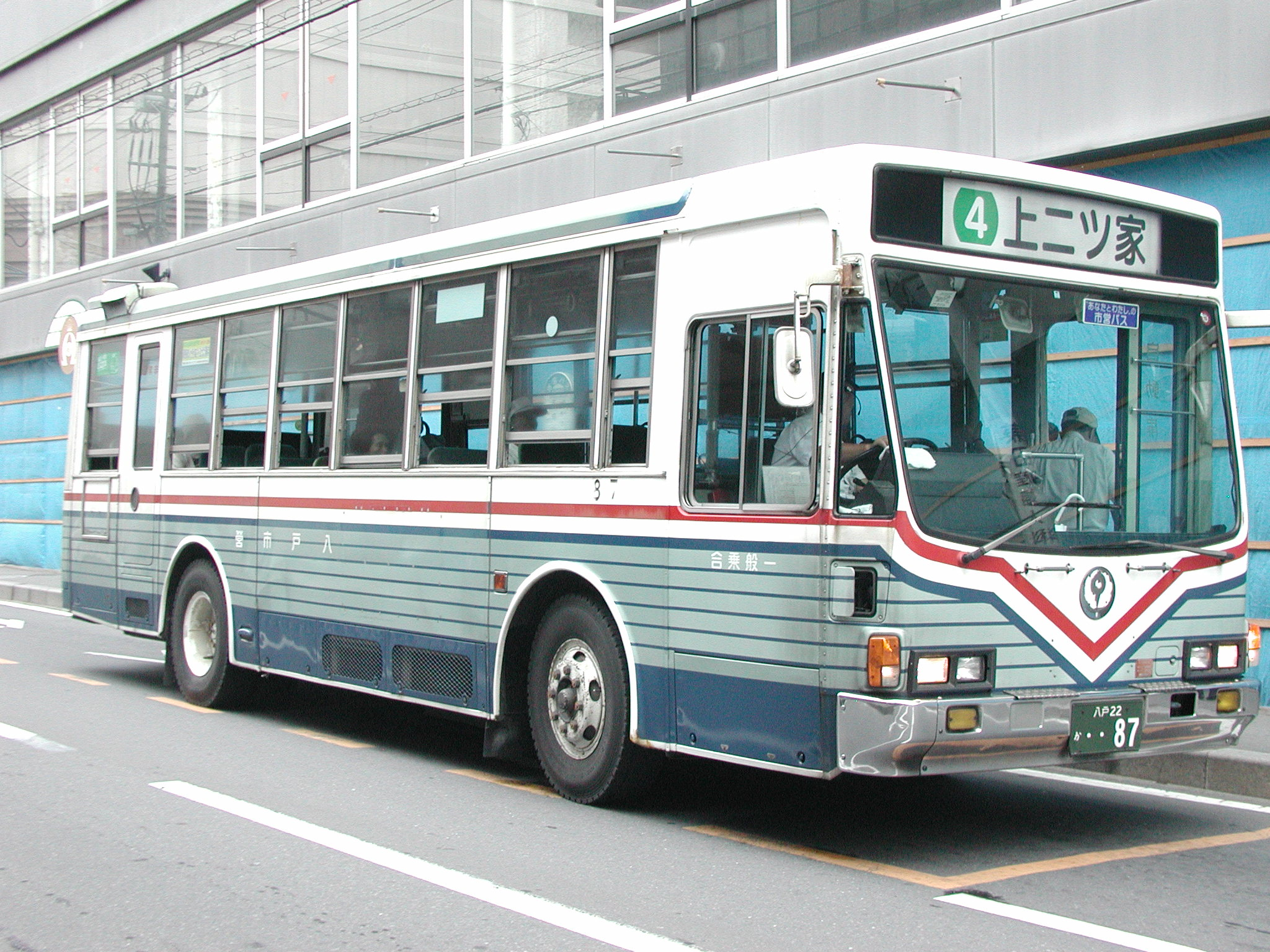 八戸市営バス一般路線塗装（いすゞ・キュービック：P-LV314K） 三日町（中央通り）バス停付近にて 同型車が車両代替に伴って除籍・廃車（一部、南部バスへ譲渡された車両もある）が進む中、これまで2台だけが残存してた車両のうちの1台（こちらは87号車）であったが、いすゞ・エルガミオPDG代新車などへの置き換えに伴い、同車は前後扉自主発注最終投入車（富士5E架装）の2台などとともに2007年12月付けで運用離脱された。